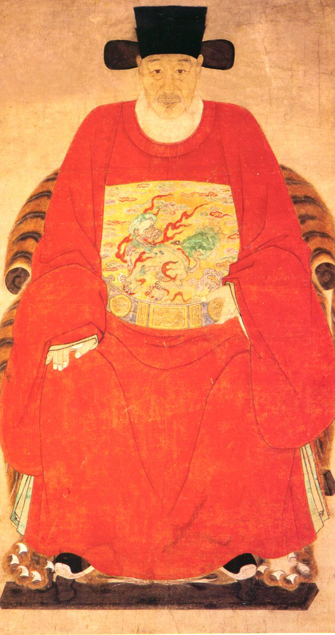 中文（香港）: 錢世楨（1561年－1642年），字子孫，號三持，蘇州府嘉定縣東錢宅（今寶山區月浦鎮）人[1]，中國明朝軍事人物，著有《東徵實紀》、《射評》[2]。